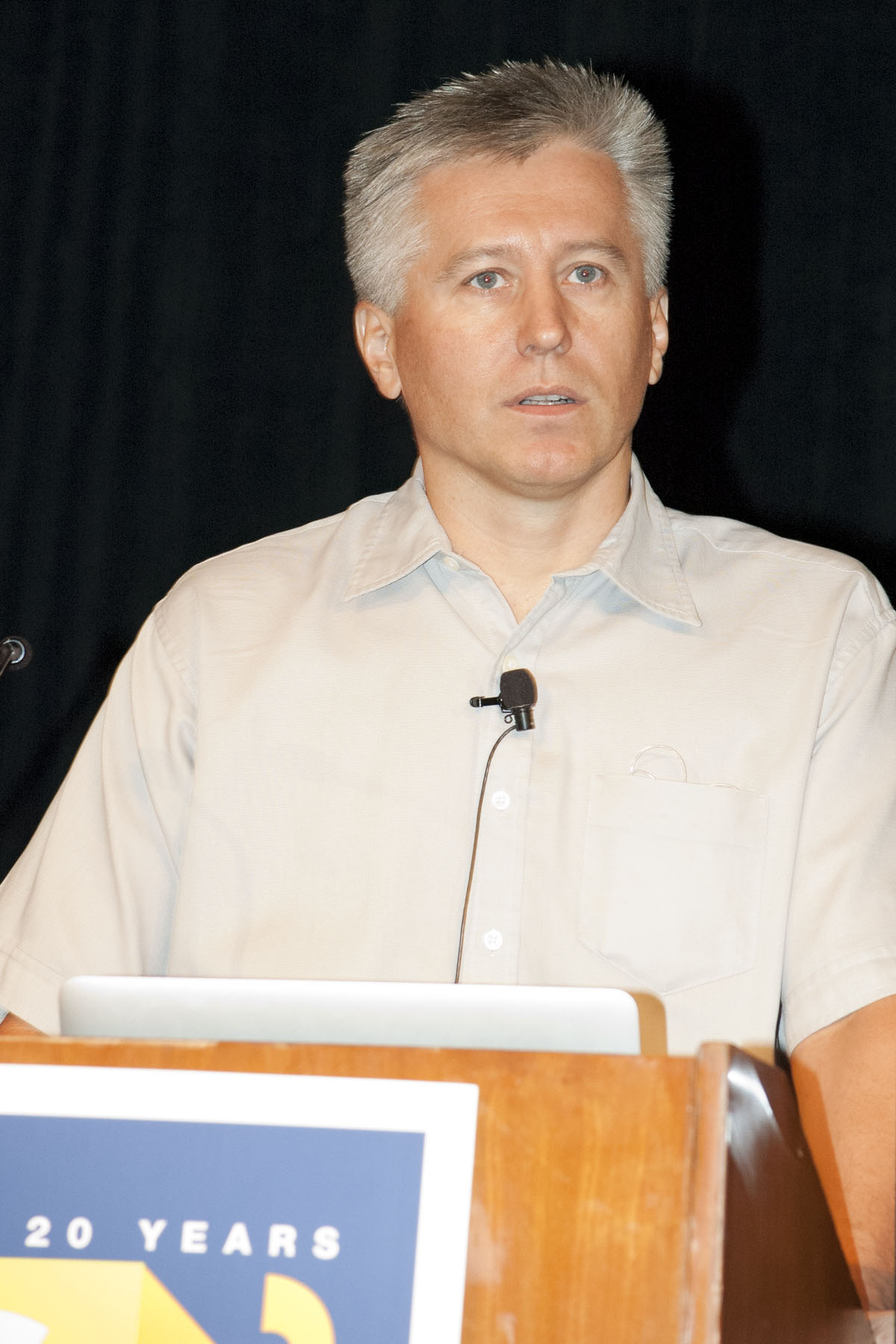 Andrej Sali, ISMB2012 Keynote Speaker (KN5)